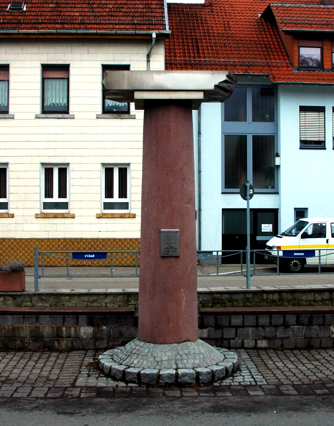 Baiertal